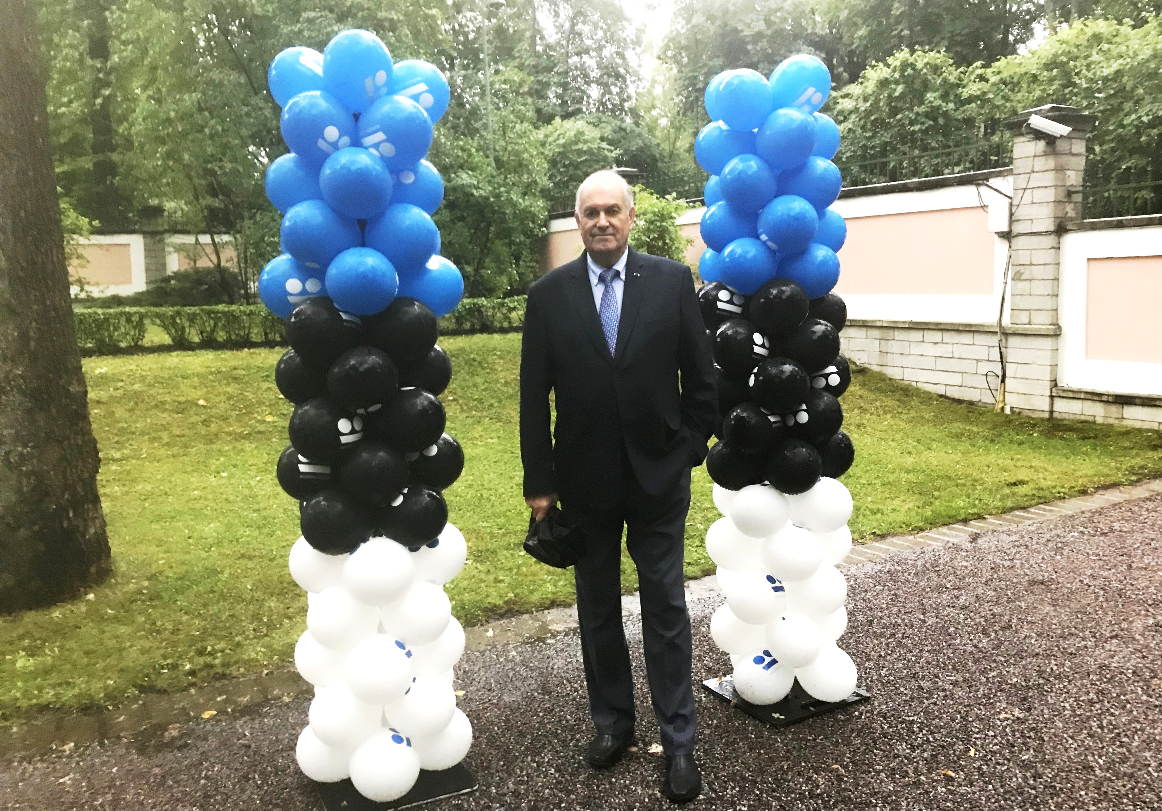 Tiit Made 2018. aastal presidendi vastuvõtul Kadrioru roosiaias.